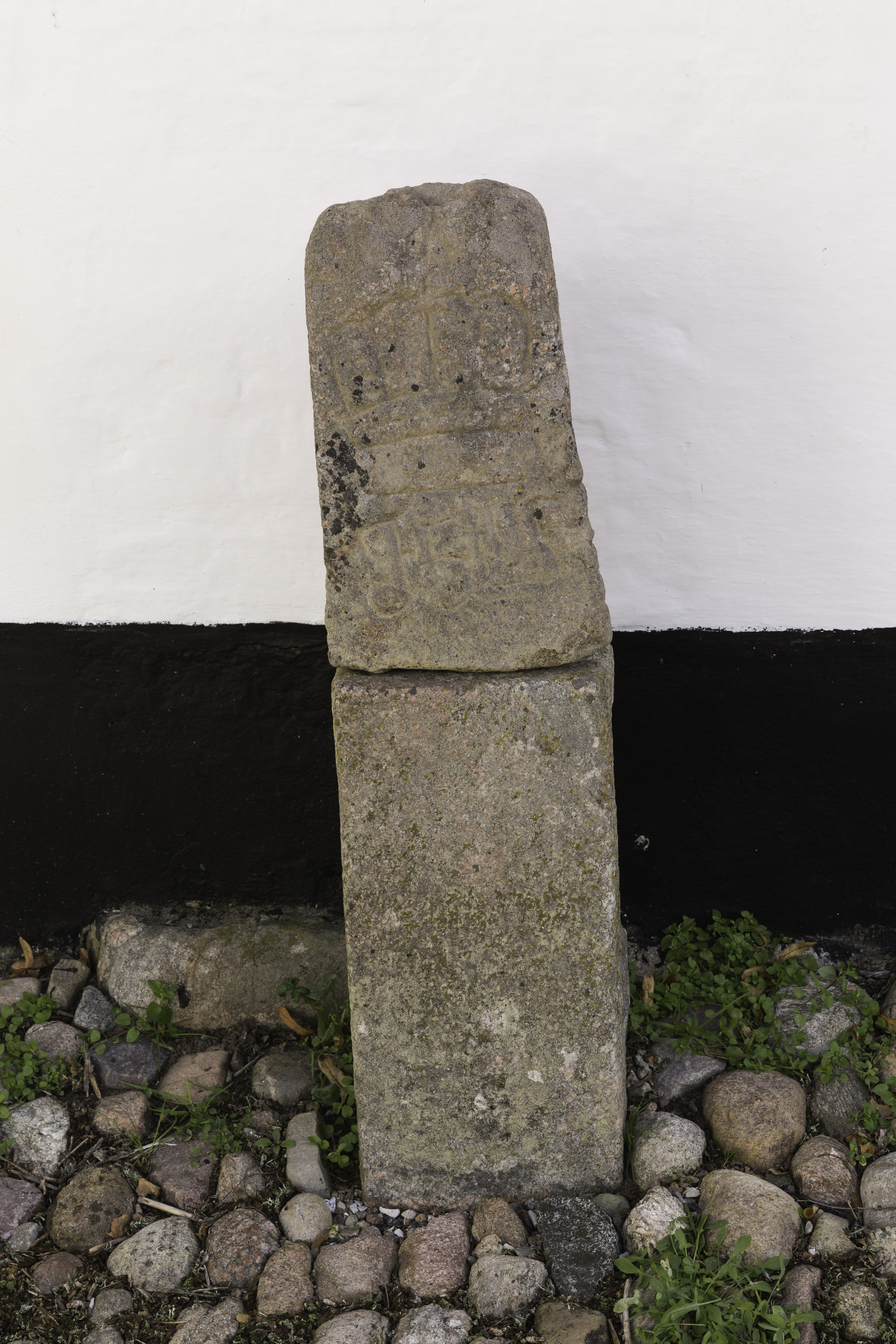 Vildtbanesten ved skovmuseum i Palsgård Skov